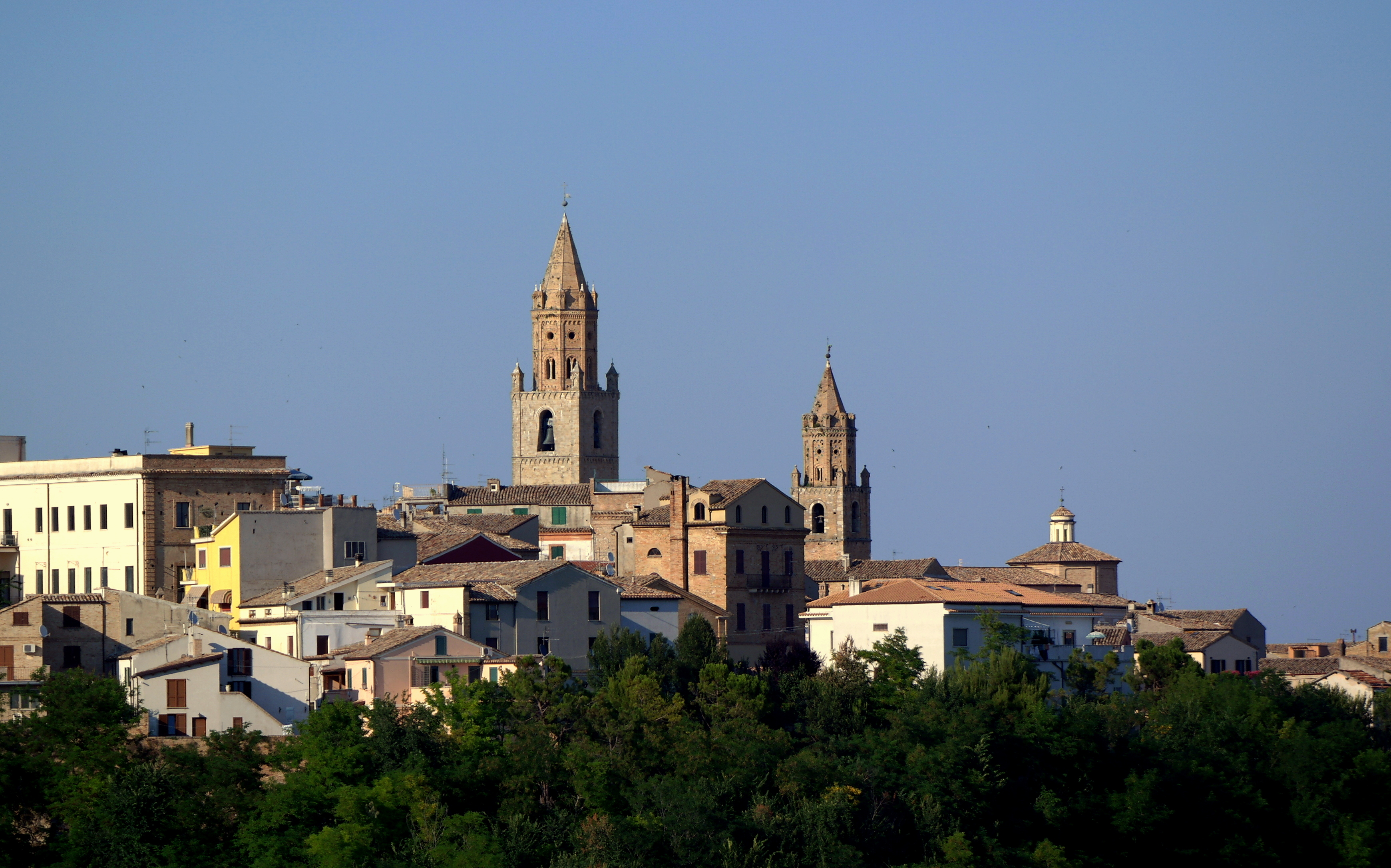 Campanili del Duomo e di Sant'Agostino ad Atri visti dal Colle di giustizia